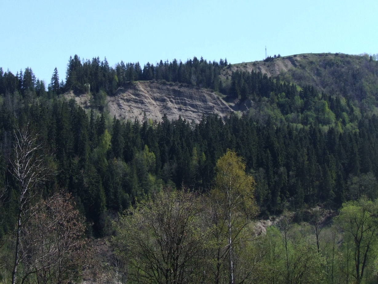 Stromo podcięte zachodnie stoki Czarnej Góry nad doliną Białki w Białce Tatrzańskiej